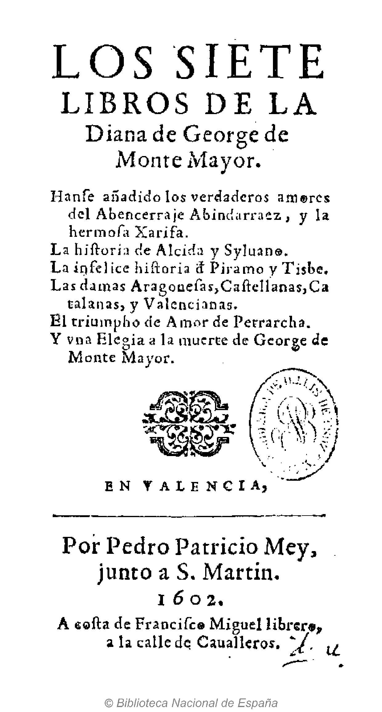 Título: Los siete libros de la Diana de George de Monte Mayor Autor: Montemayor, Jorge de (1520?-1561) Editor: Pedro Patricio Mey ... Fecha de publicación: 1602